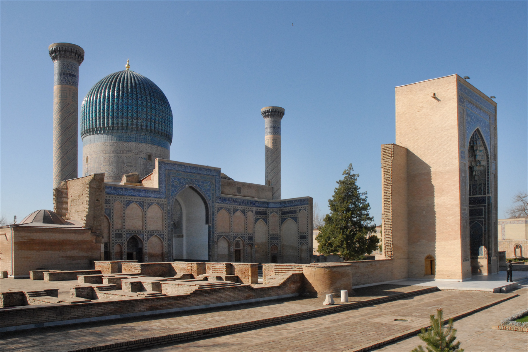 Le Gour Emir est le mausolée de Tamerlan, dont la République d'Ouzbékistan (d'après l'URSS), a fait un symbole de grandeur et d'indépendance. Les statues de Tamerlan, un conquérant sanguinaire et impérialiste, dans la lignée de Gengis Khan, ont ainsi remplacé celles de Lénine ou de Staline sur toutes les grandes places des cités. Le mausolée Gour Emir) a été construit en 1401 par le petit-fils de Tamerlan, qui y est enterré comme son grand-père et d'autres membres de la famille timouride. Il est somptueusement décoré. A l'origine, le mausolée comprenait également une madrasa (école coranique) et une khanaka (résidence des derviches) situées autour d'une cour centrale. Seul le portail et le mausolée de l'ensemble existent encore. Ils ont été restaurés et l'environnement a été dégagé des habitations secondaires. Le portail est l'oeuvre d'un persan Mohamed, fils de Mahmoud, ramené de force de Perse par Tamerlan à la suite de ses conquêtes comme la plupart des architectes et artisans qui ont construit Samarcande. Le style architectural des monuments de Samarcande est de fait très voisin de celui des grands monuments perses, avec néanmoins des caractéristiques esthétiques régionales à Samarcande, Boukhara ou Khiva.